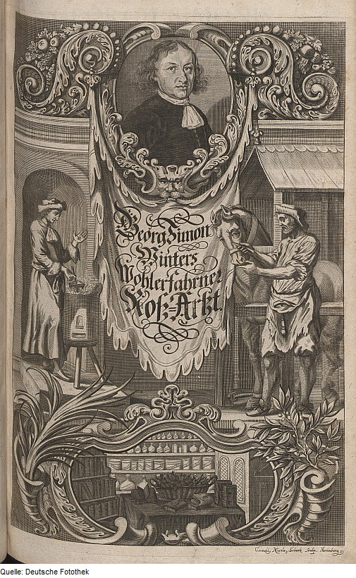 Original image description from the Deutsche Fotothek Nutztierhaltung & Tiermedizin & Pferd & Krankheit